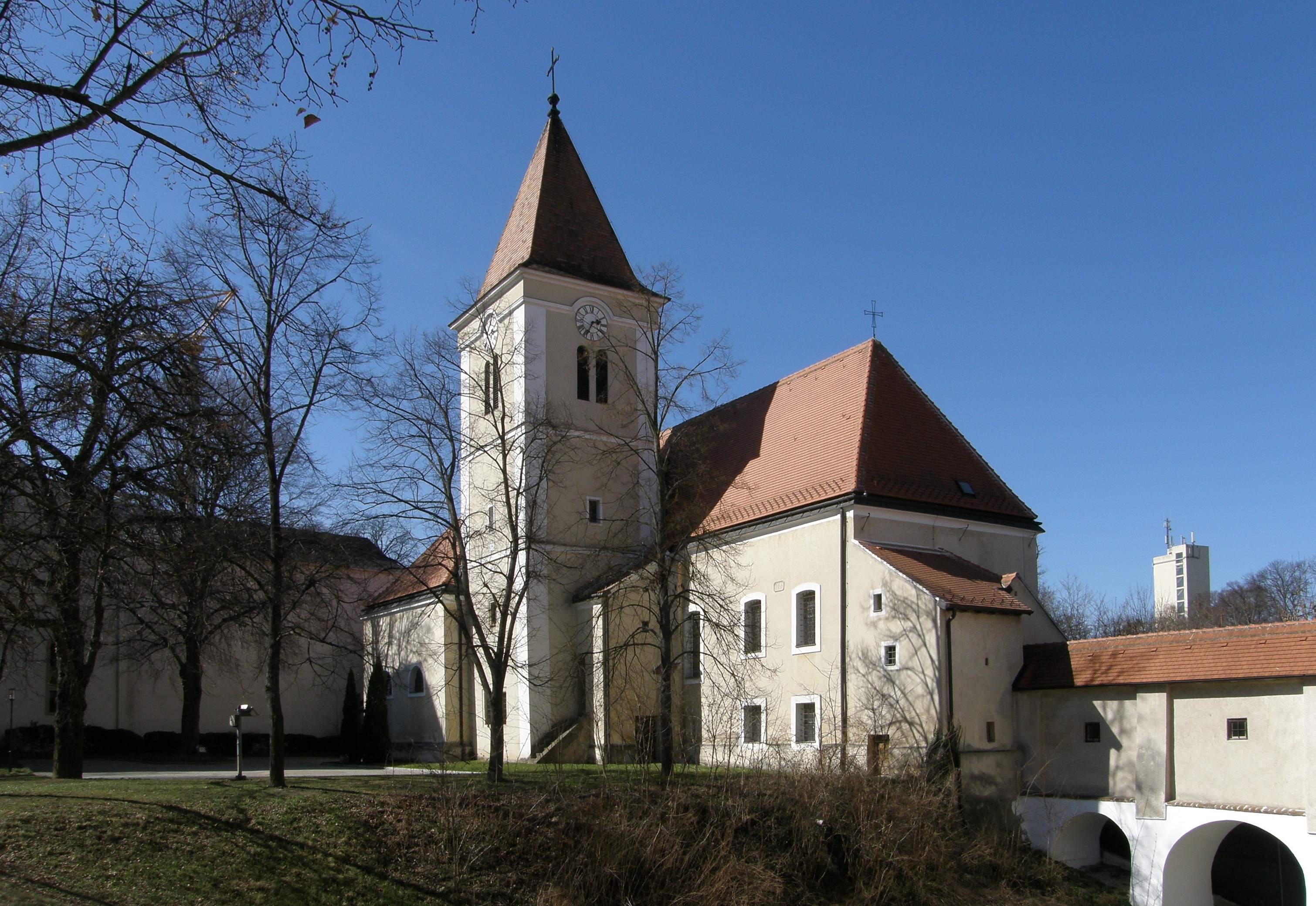 Kath. Pfarrkirche hl. Pankratius